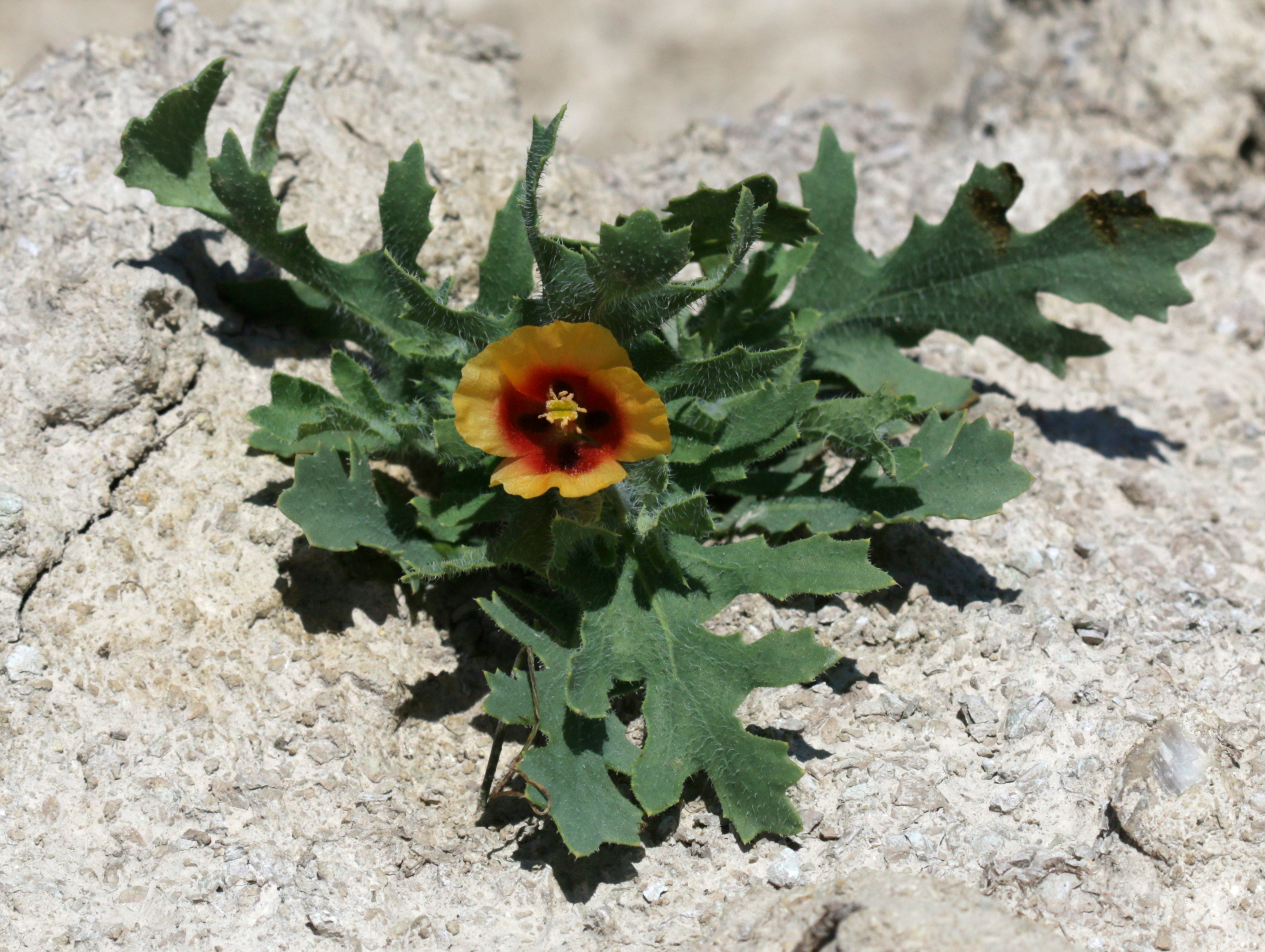 Campo de Belchite, Aragon, Spain